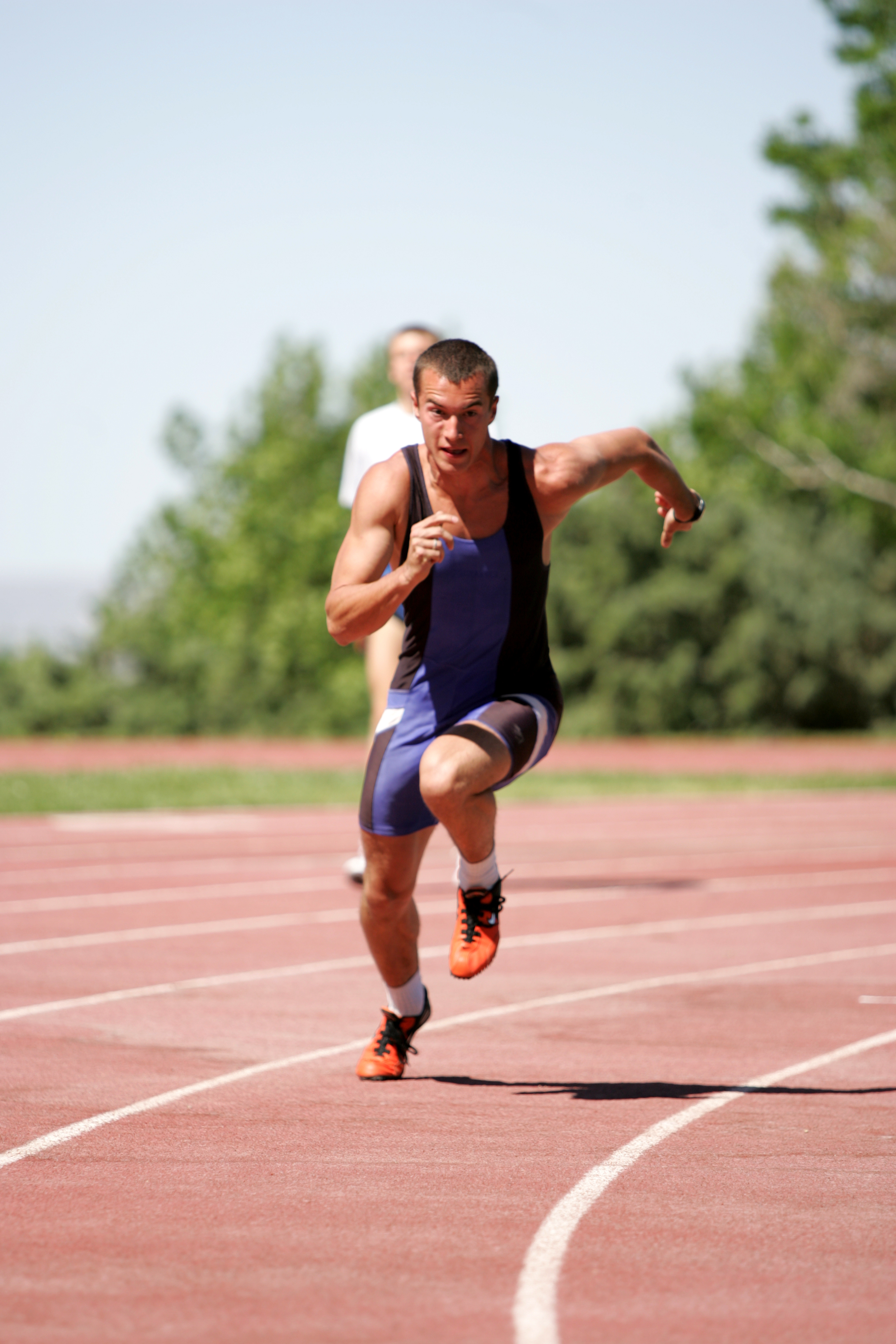 olimpijczyk z Aten i Pekinu